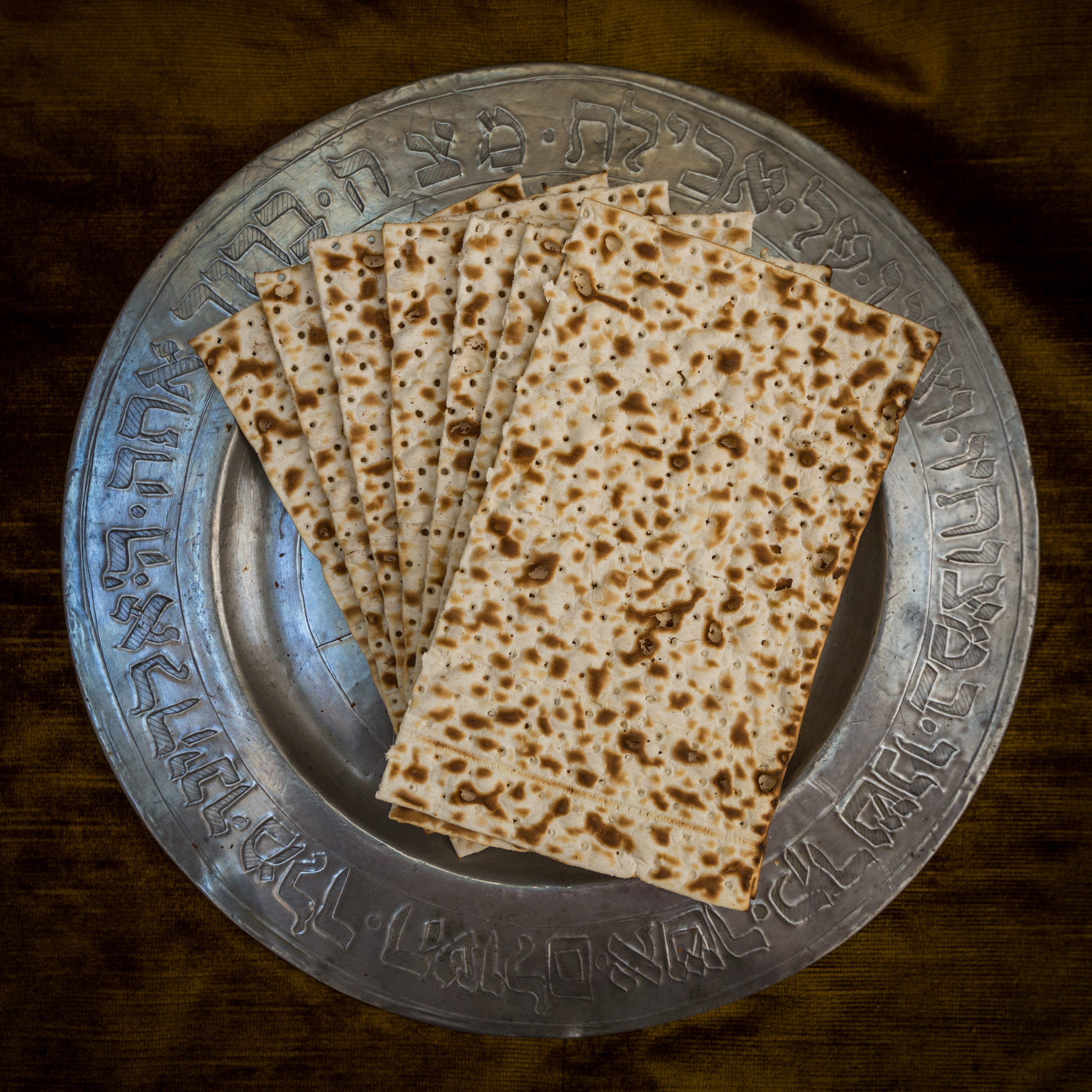 Matzot René Neymann Wasselonne avril 2014